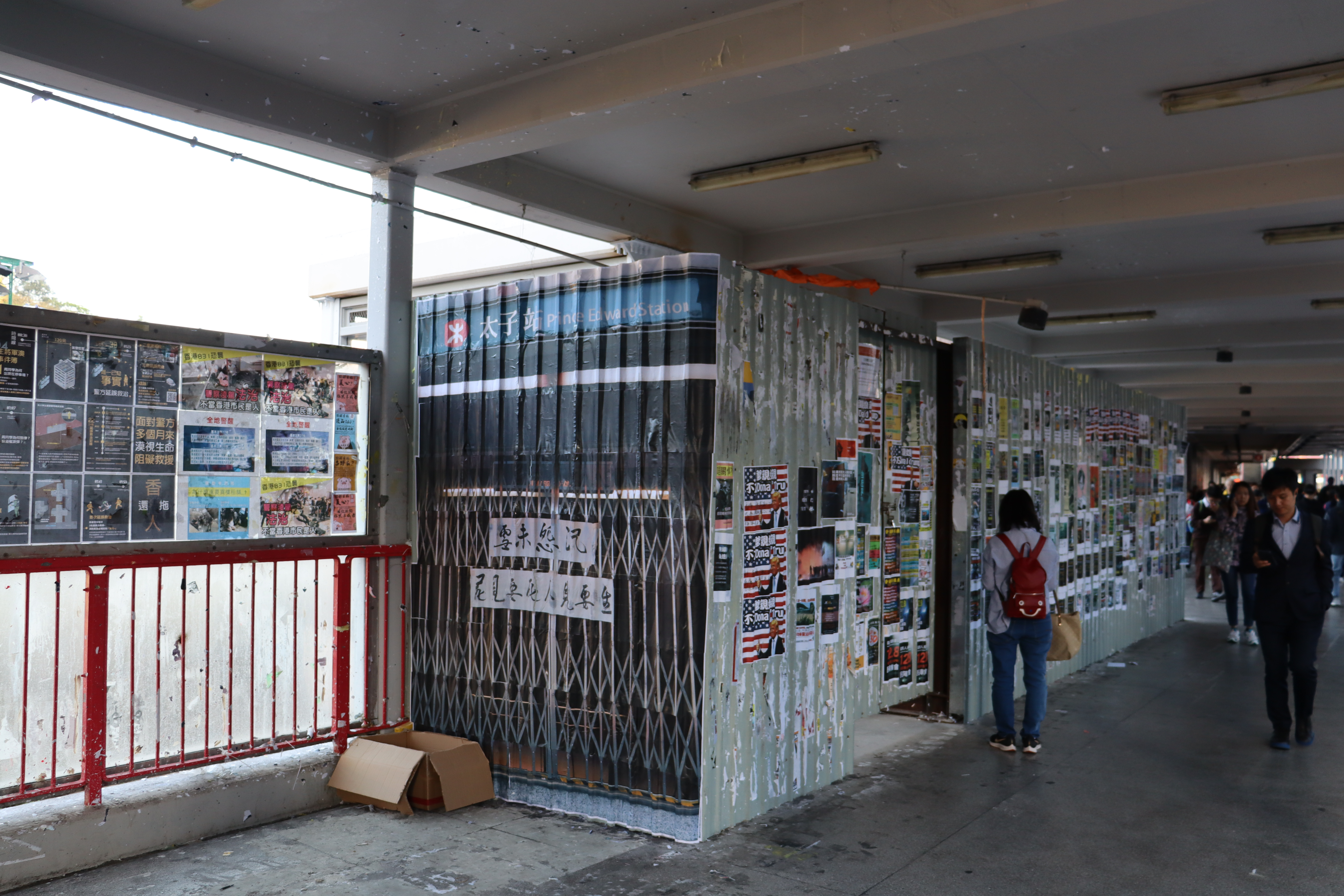 中文（香港）: 位於荃灣站的太子站模型